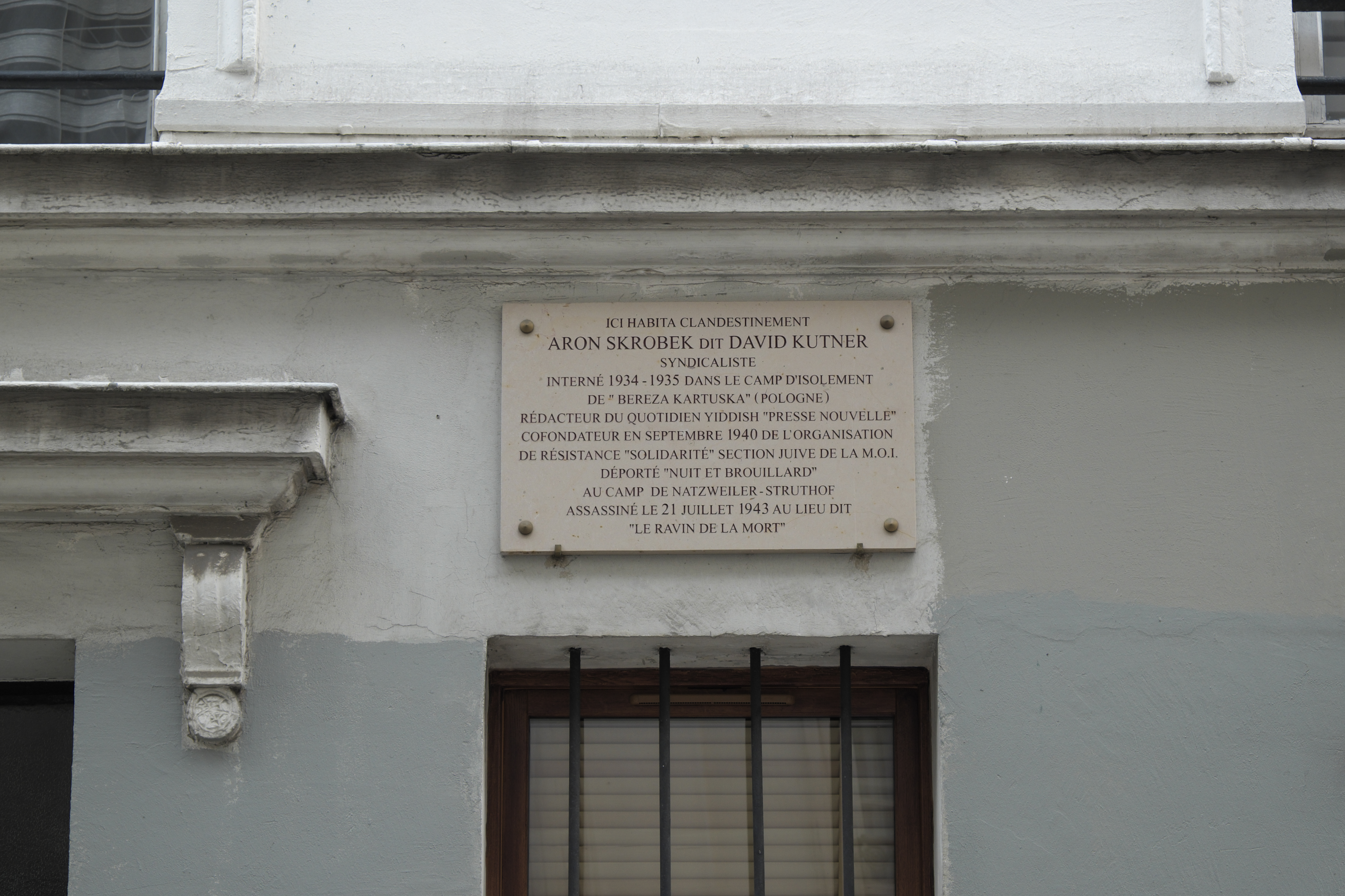 Rue des Trois-Frères n° 4 auf Montmartre im 18. Arrondissement in Paris (Île-de-France/Frankreich), Gedenktafel für Aron Skrobek